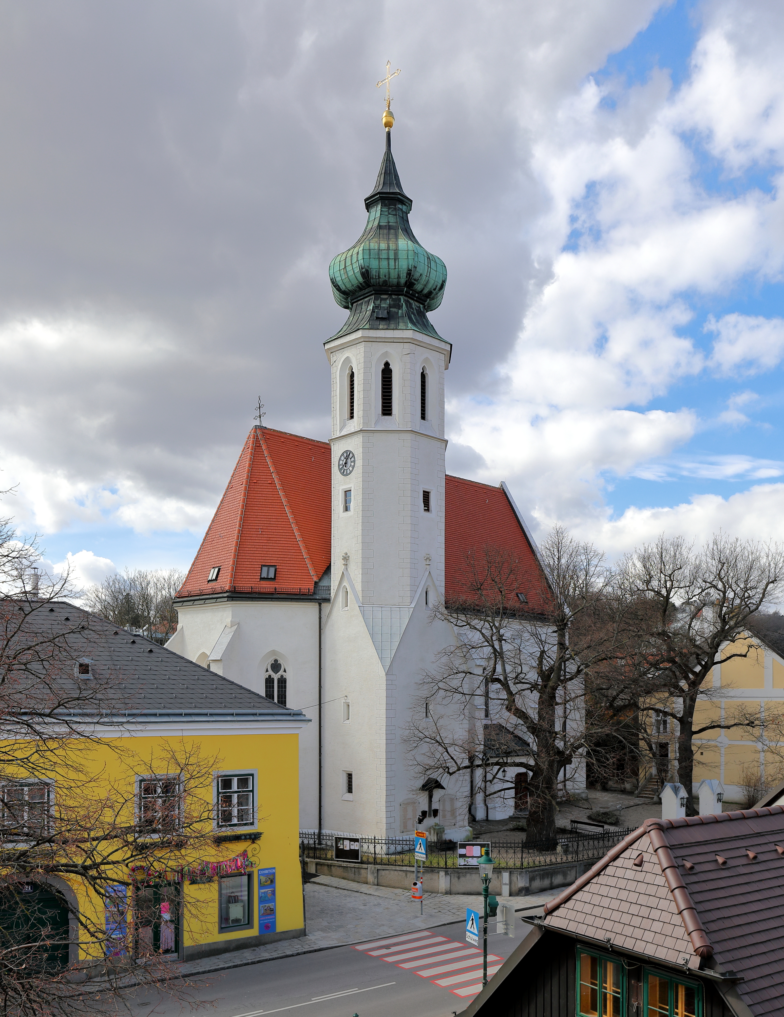 Die röm.-kath. Pfarrkirche Grinzing im 19. Wiener Gemeindebezirk Döbling.